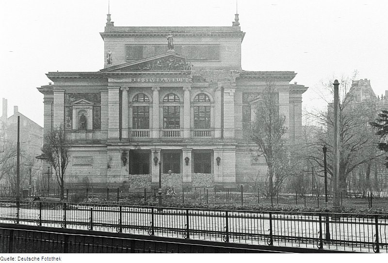 Original image description from the Deutsche Fotothek Beschädigtes Gewandhaus